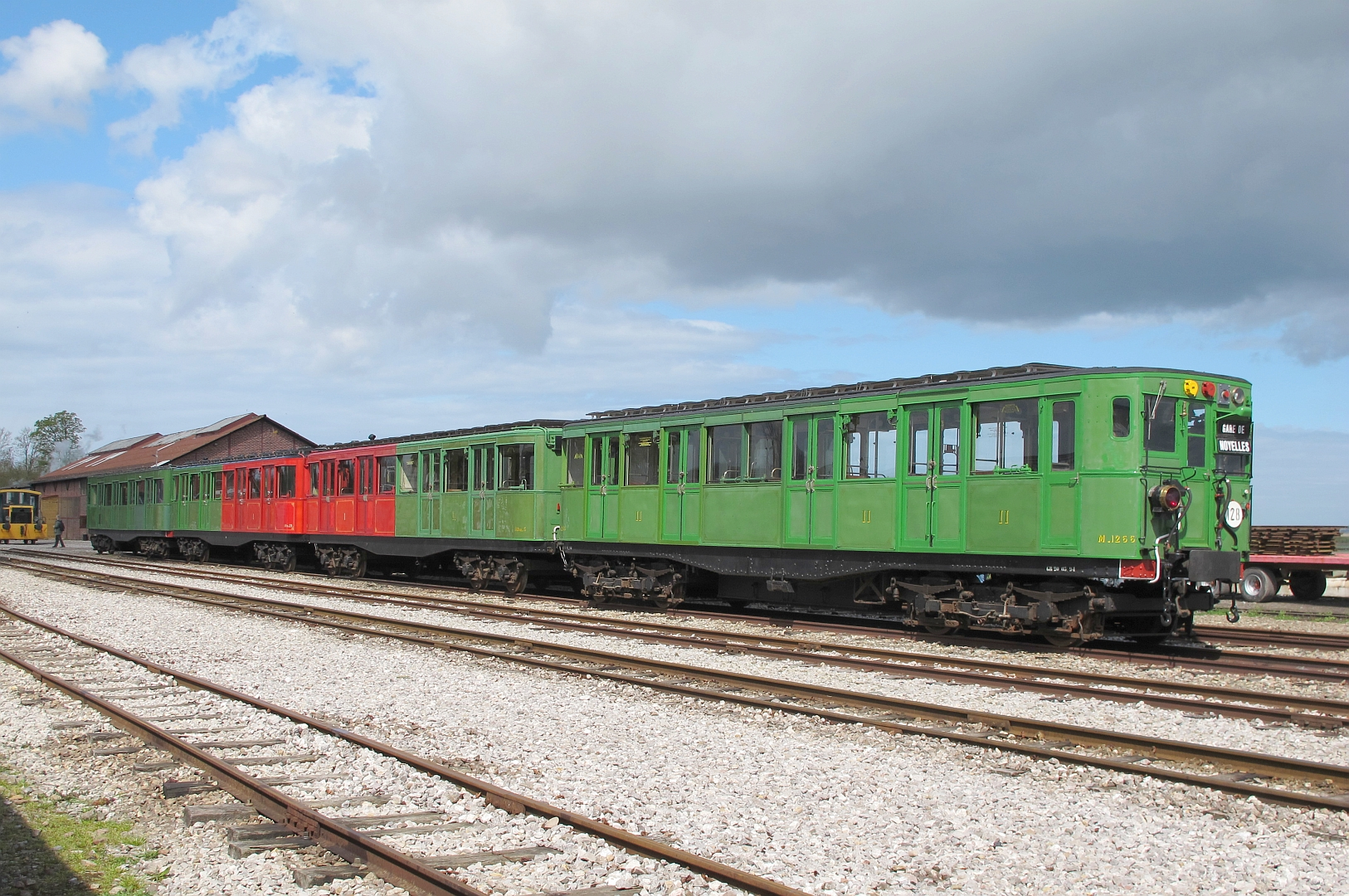 La rame Sprague-Thomson à Saint-Valery-Canal sur le chemin de fer de la baie de Somme le 15 avril 2016.